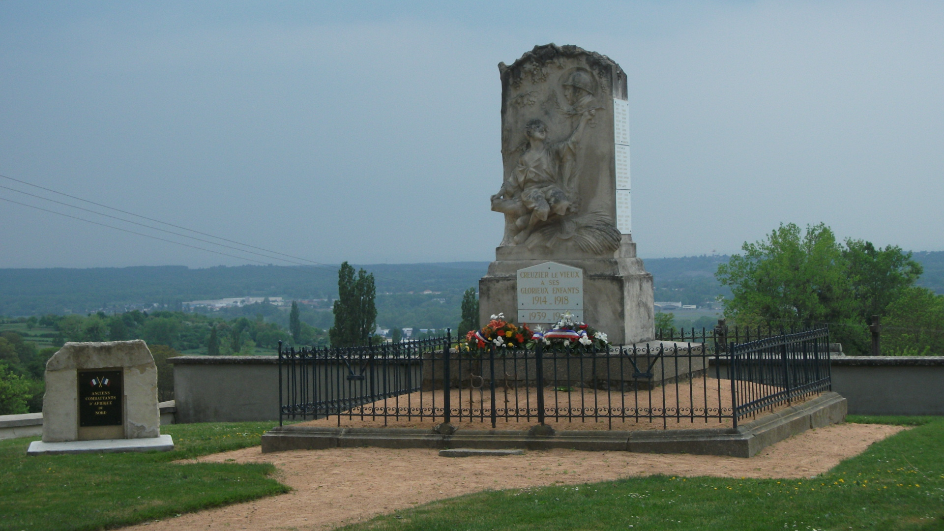 Monument aux morts de Creuzier-le-Vieux (Allier, Auvergne, France) à proximité de l'église